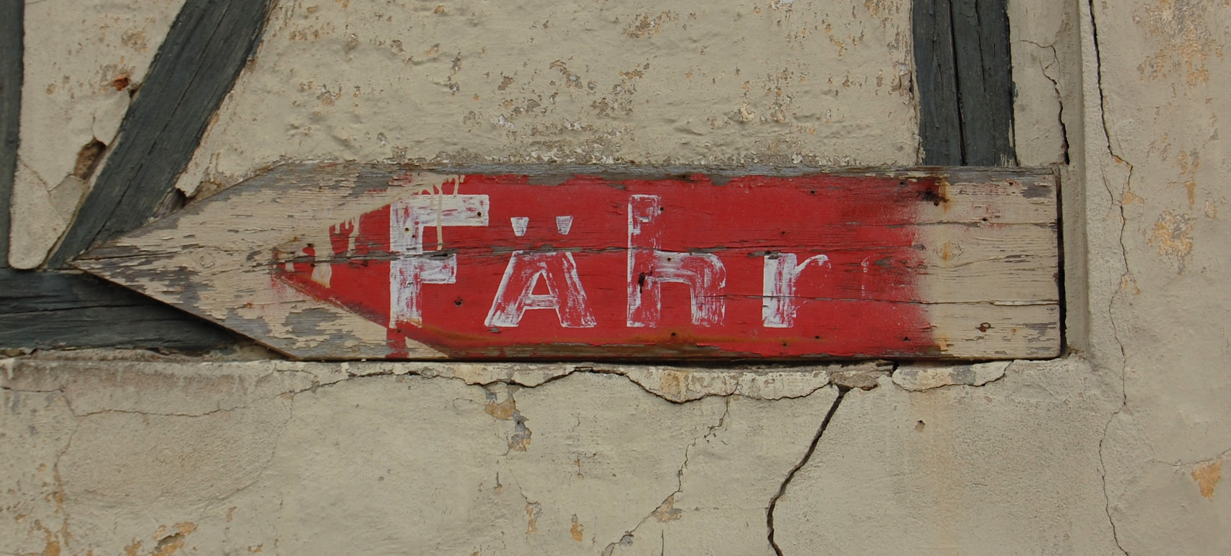 altes Schild in der Repkowstraße in Magdeburg-Salbke, welches auf die seit Jahrzehnten nicht mehr bestehende Elbfähre Salbke hinweist